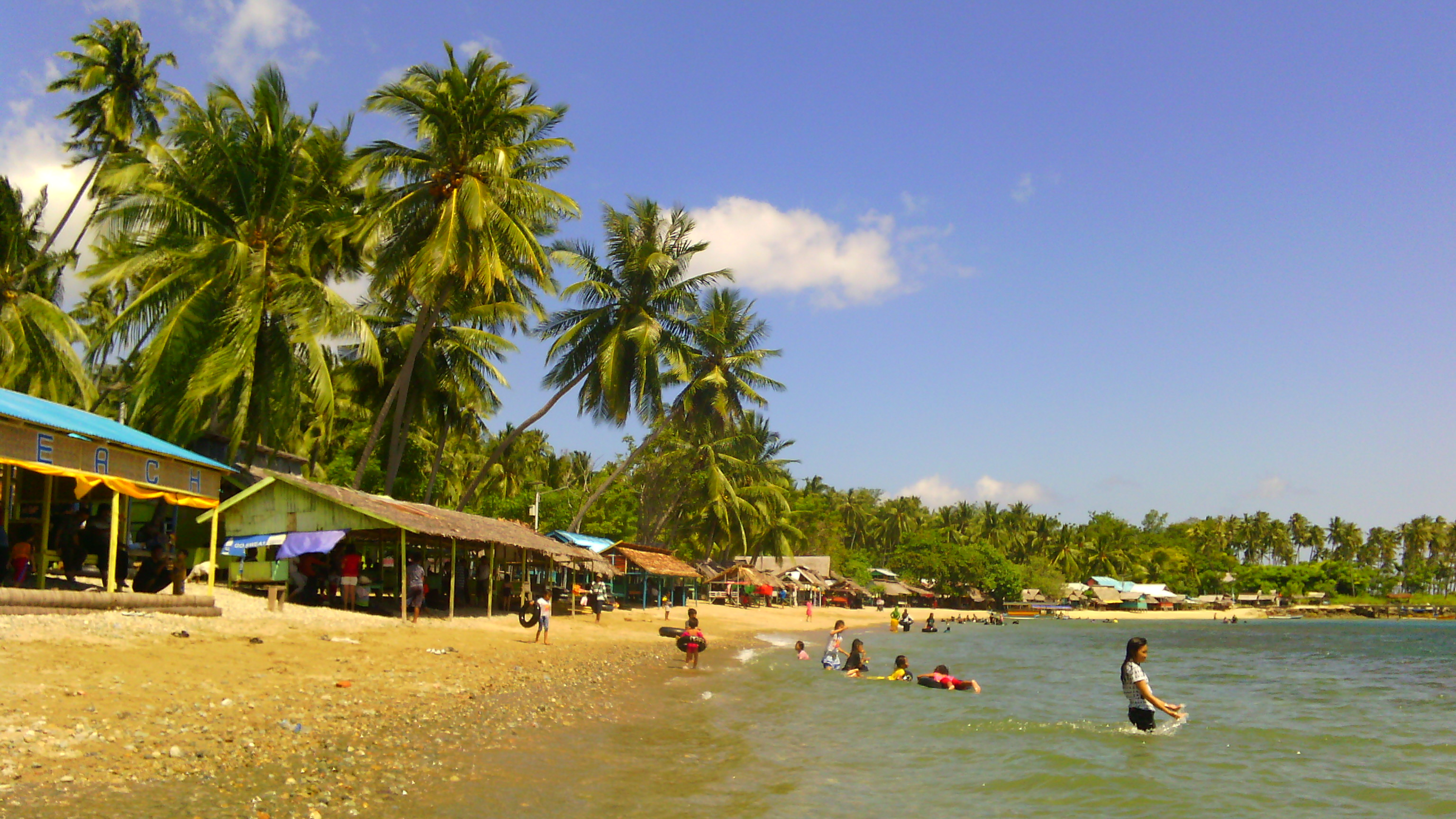 Wisatawan lokal bersantai di pantai Botutonuo